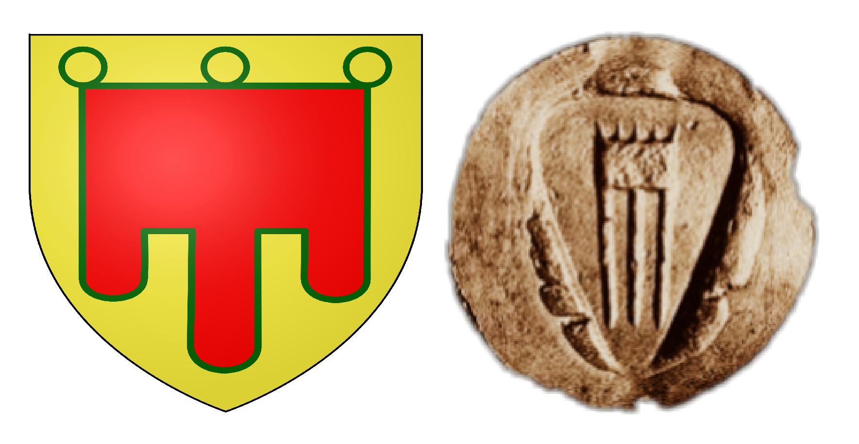 Armes et blason de Robert IV d'Auvergne. Source Guy II d'Auvergne, sceau du XIIème siècle - Verso - Blason. Sigillographie de l'ancienne Auvergne (XIIe-XVIe siècles), par Philippe de Bosredon - 1895.